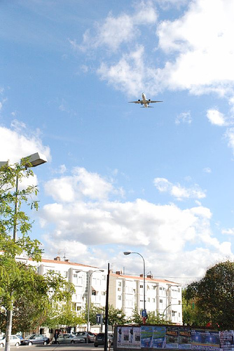 entry lane Barajas Airport (MAD) seen from San Fernando de Henares